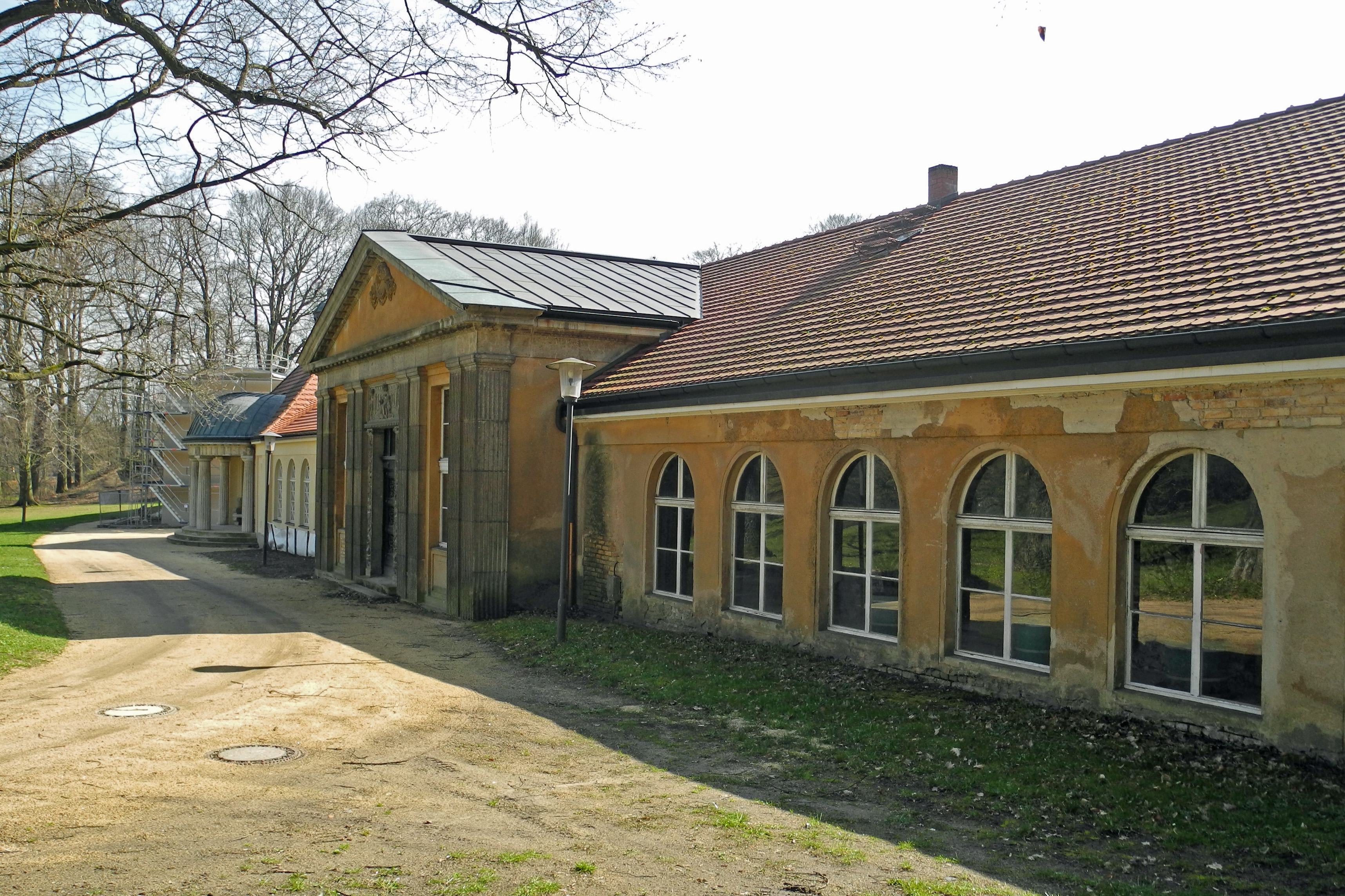 Muskauer Park – Badepark. Ehem. Badehaus Hermannsbad.